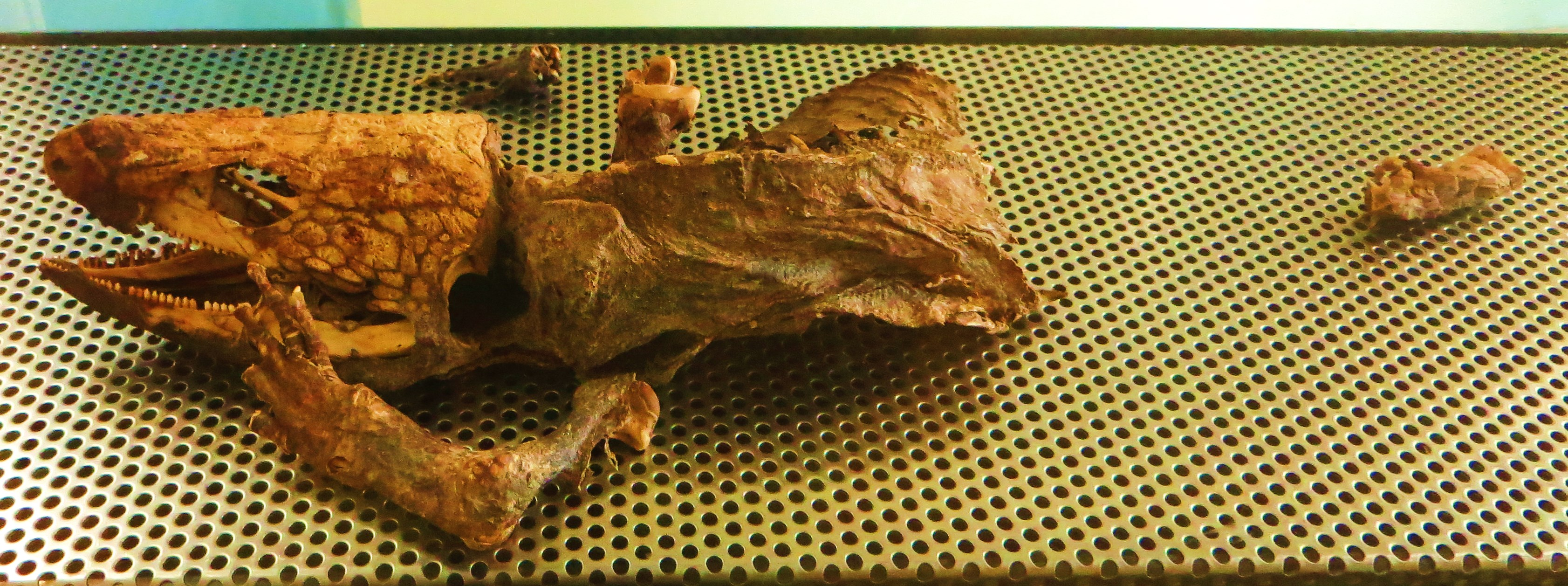 Fossil of Gallotia, an extinct reptile- Took the picture at Museo de la Naturaleza y el Hombre - Tenerife